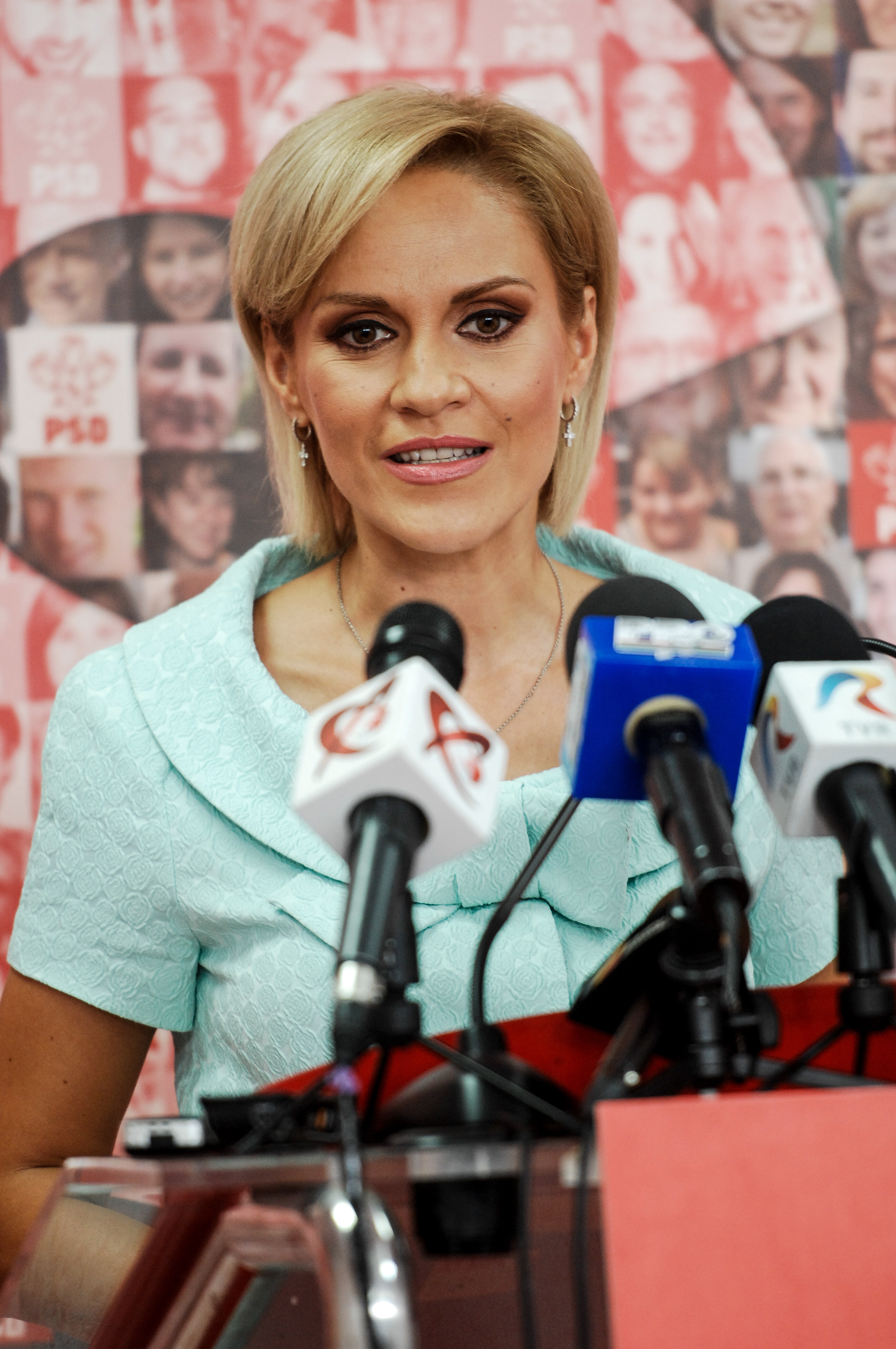 Gabriela Firea la sediul PSD - 14 (4)